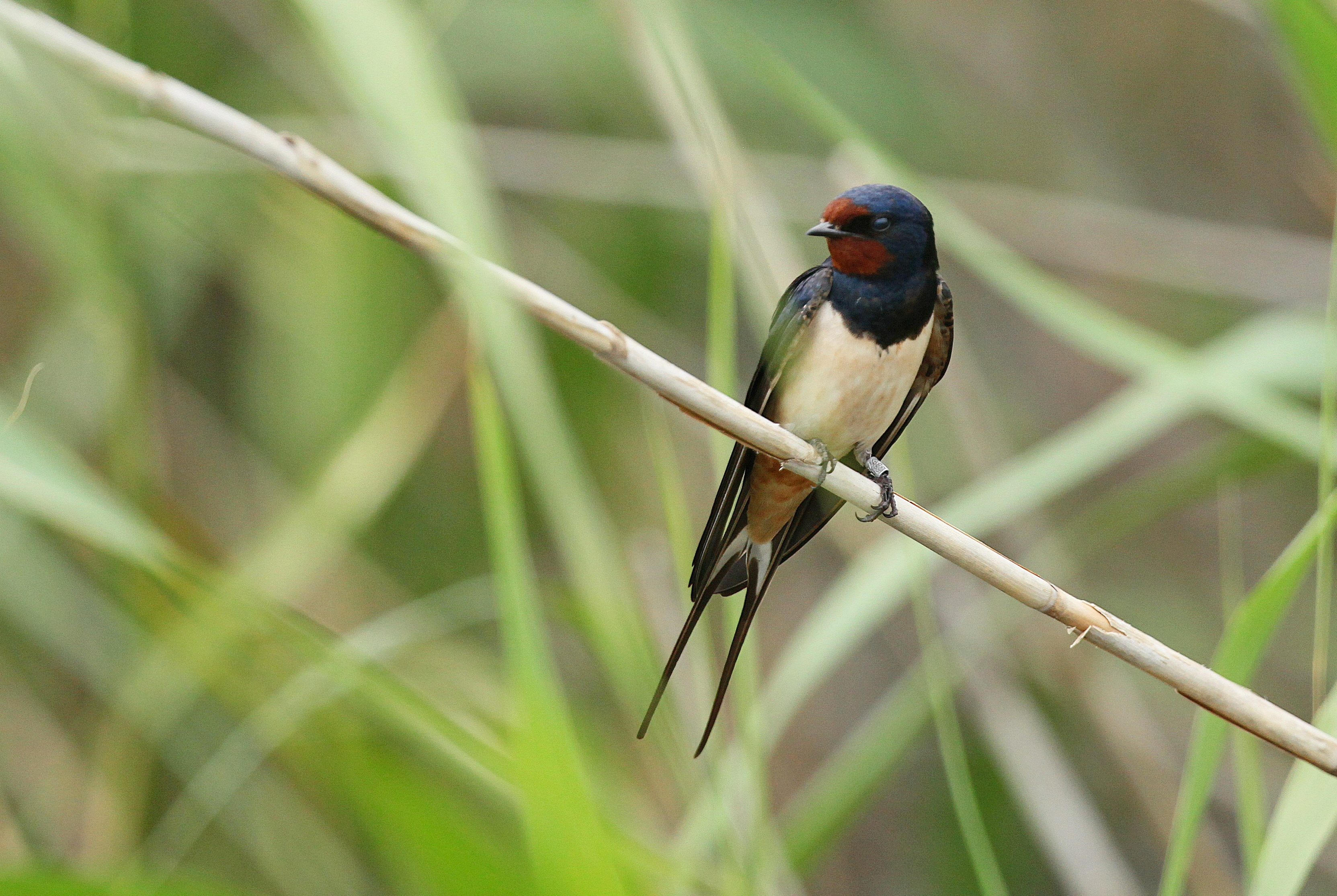 Rauchschwalbe im Schilf beim Ausruhen von der Insektenjagd; Rieselfelder Windel im LSG „Feuchtsenne“, Bielefeld.